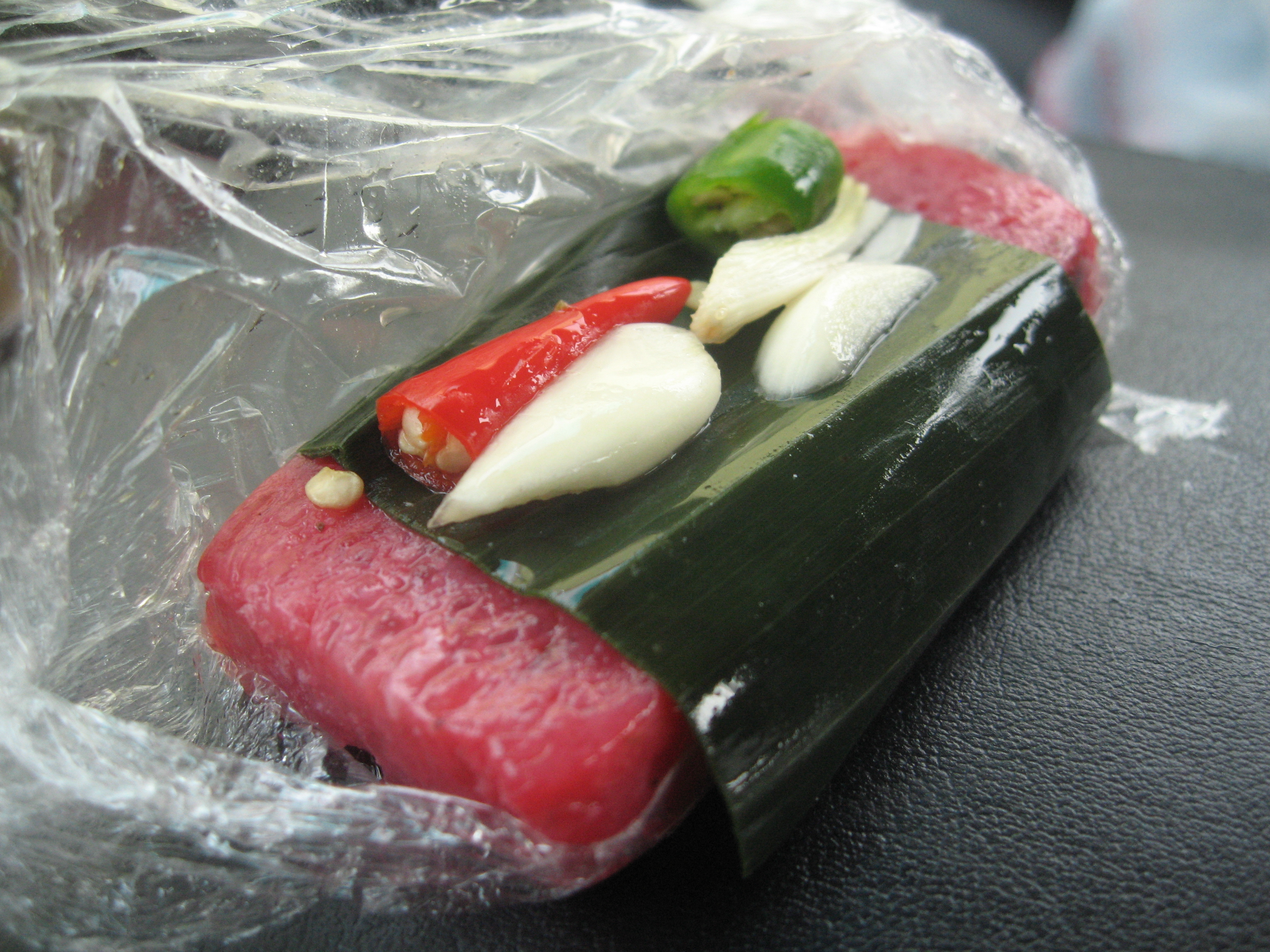 @ Thanh Son Tofu